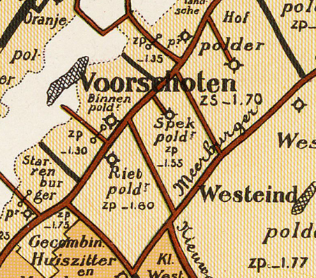 Spekpolder